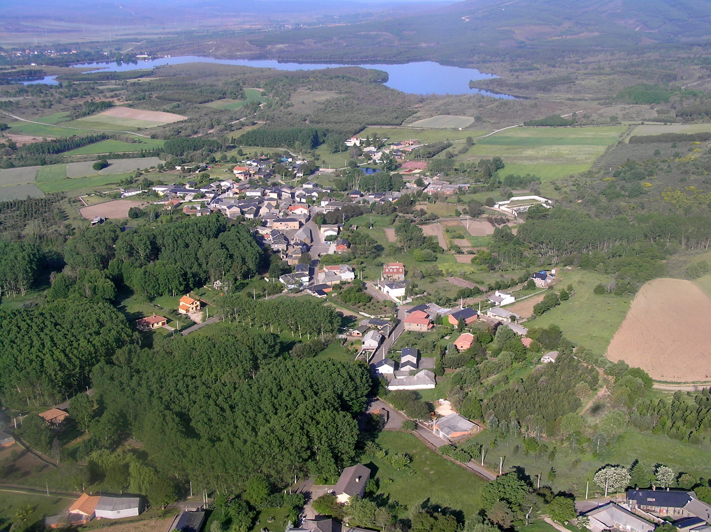 quintana del castillo desde el aire